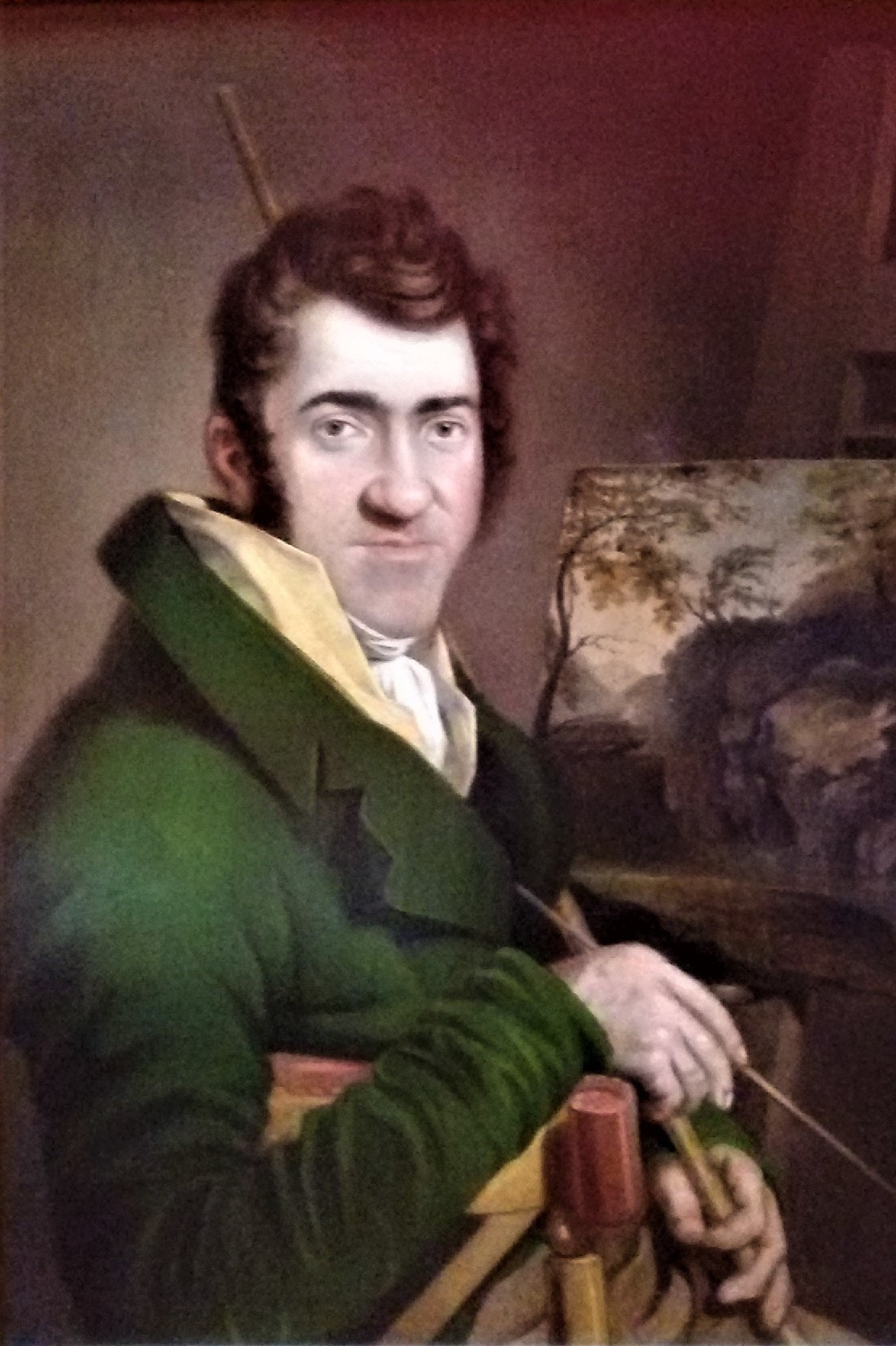 Autoritratto di George Barret Jr.